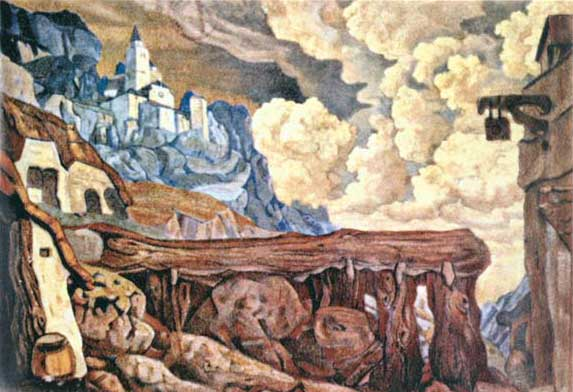 "Старинный театр" просуществовал только один сезон, но с осени 1911 года он снова возрождается, и опять на один сезон. Для оформления представлений вновь был приглашён Н.К. Рерих. Highslide JS Театр открывается пьесой испанского драматурга Лопе де Вега "Фуенте Овехуна" ("Овечий источник"). Shown for the first time in 1911 in St. Petersburg